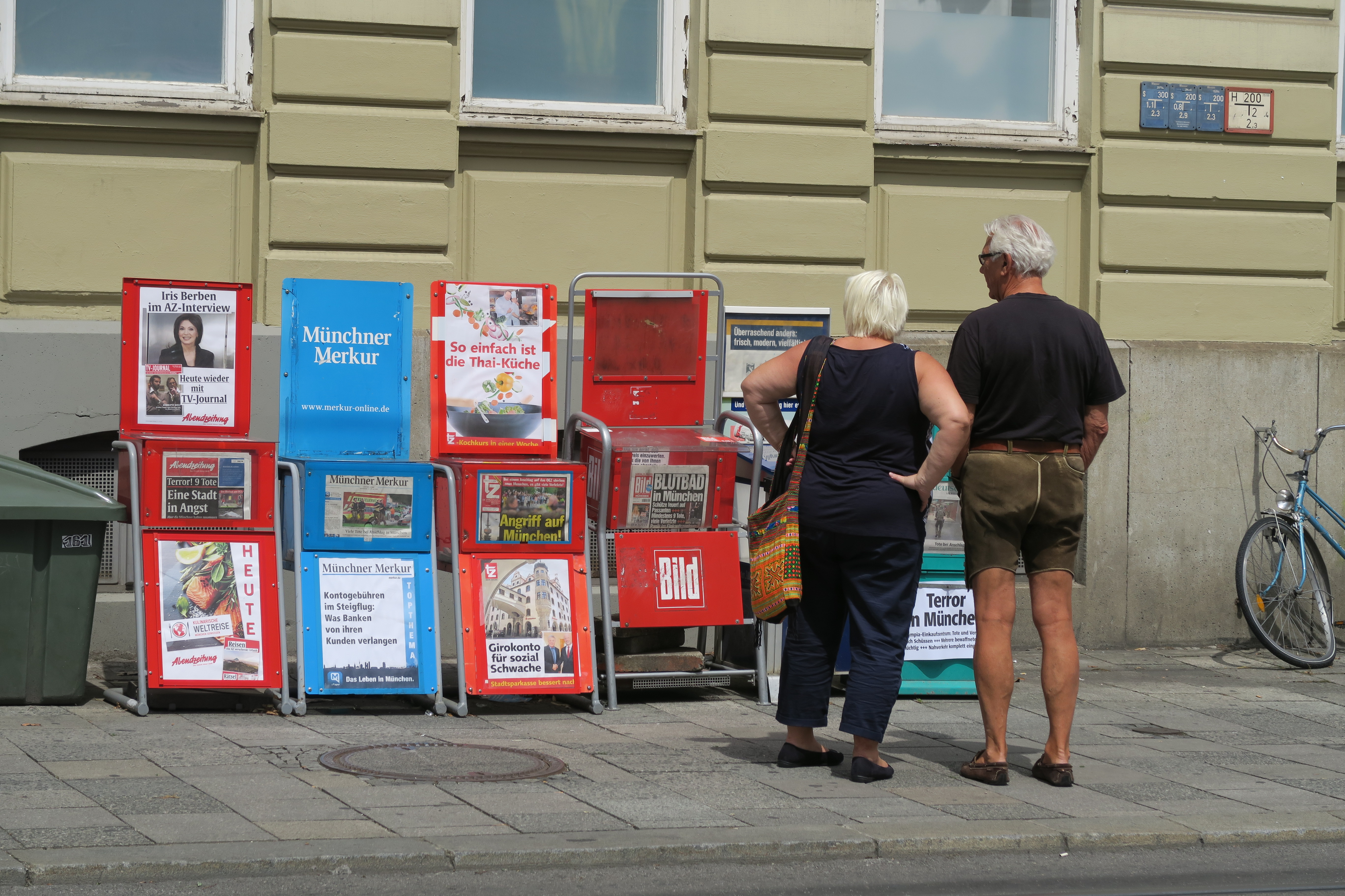 Schlagzeilen am Tag nach dem Amoklauf in München am 22. Juli 2016